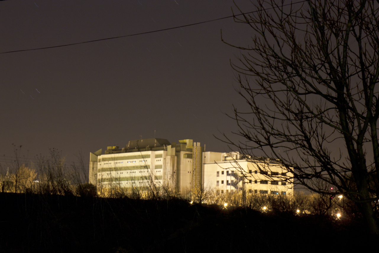 Visión nocturna del edificio del CNB en Cantoblanco (Madrid)